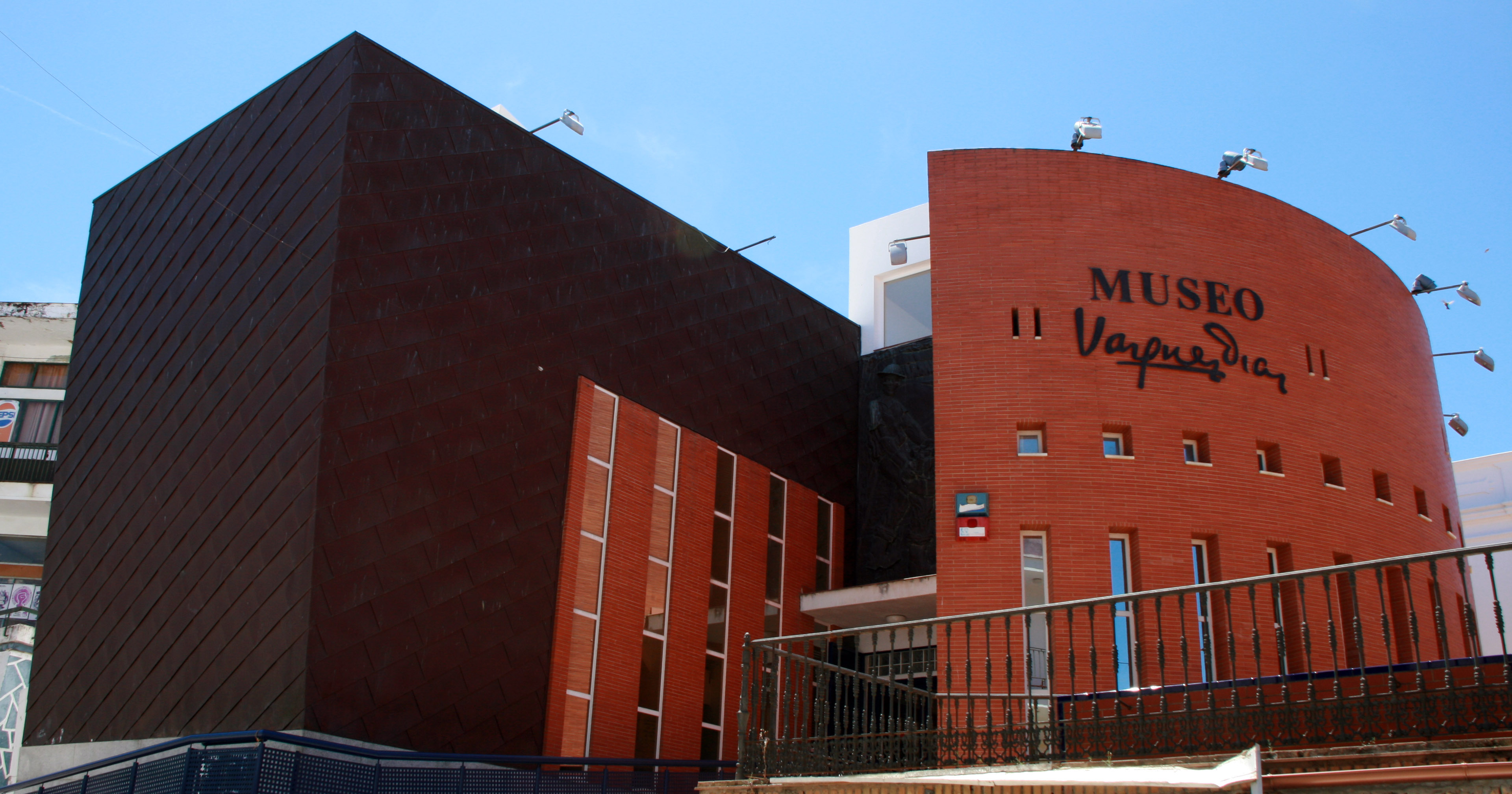 Museo Vazquez Díaz (Nerva, 2018)